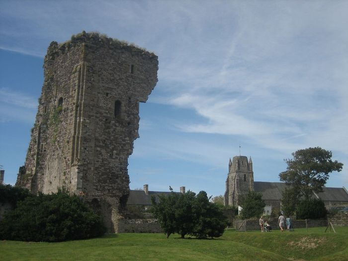 Regnéville-sur-Mer (Manche) château et église